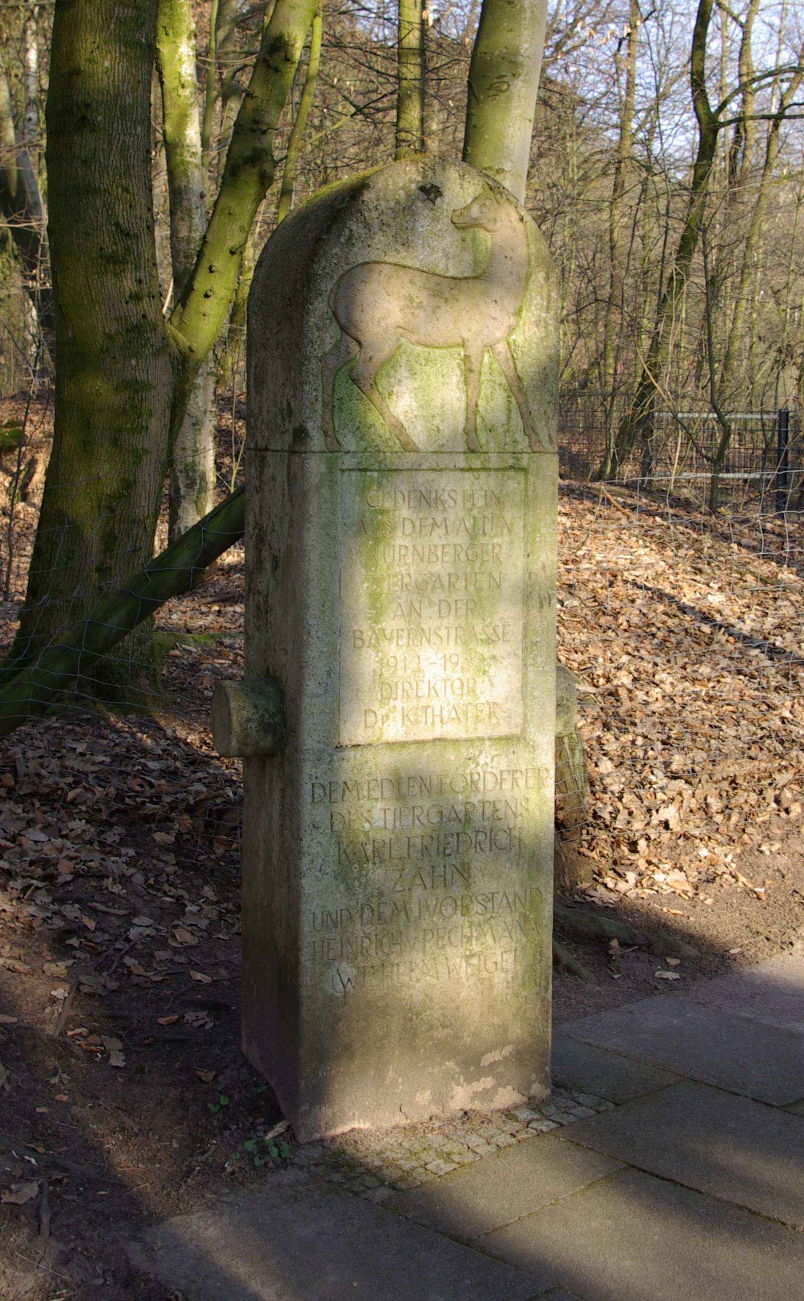 Gedenkstein aus dem alten Nürnberger Tiergarten, der sich von 1912 bis 1939 an der Bayernstraße befand und dem Reichsparteitagsgelände weichen musste.